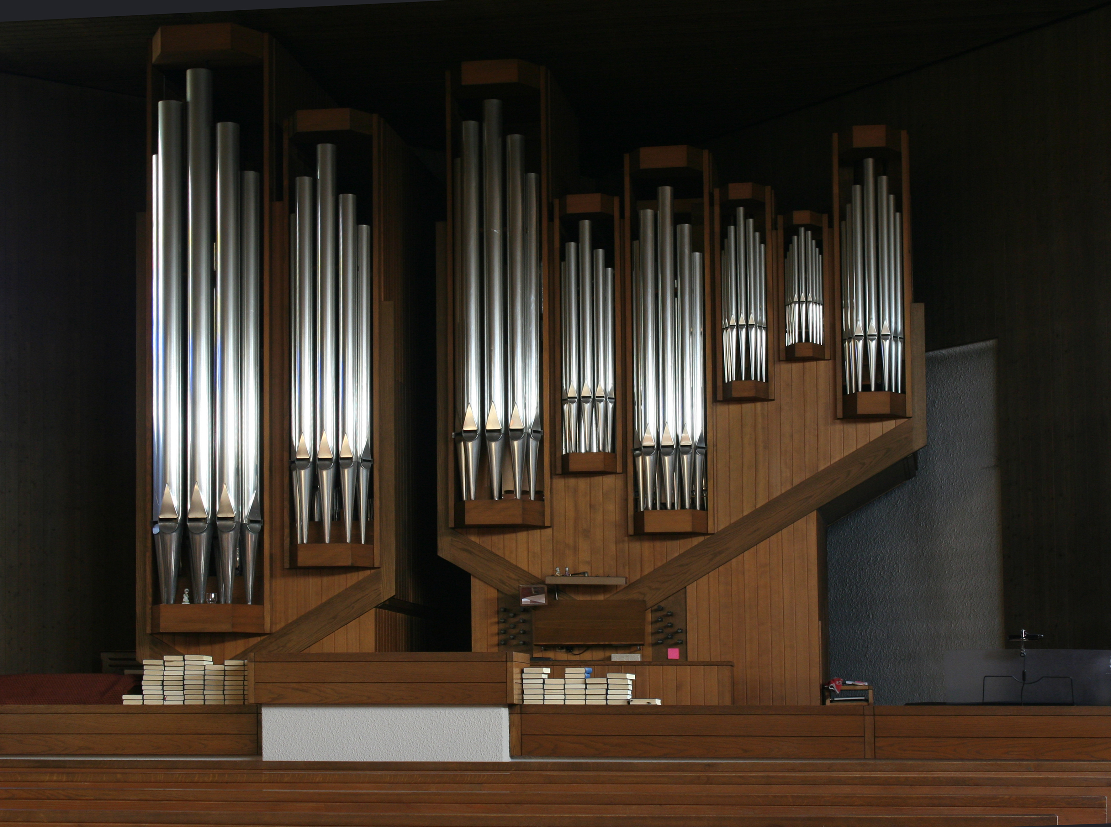 Römisch-katholische Pfarrkirche St. Michael Dietlikon, Orgel